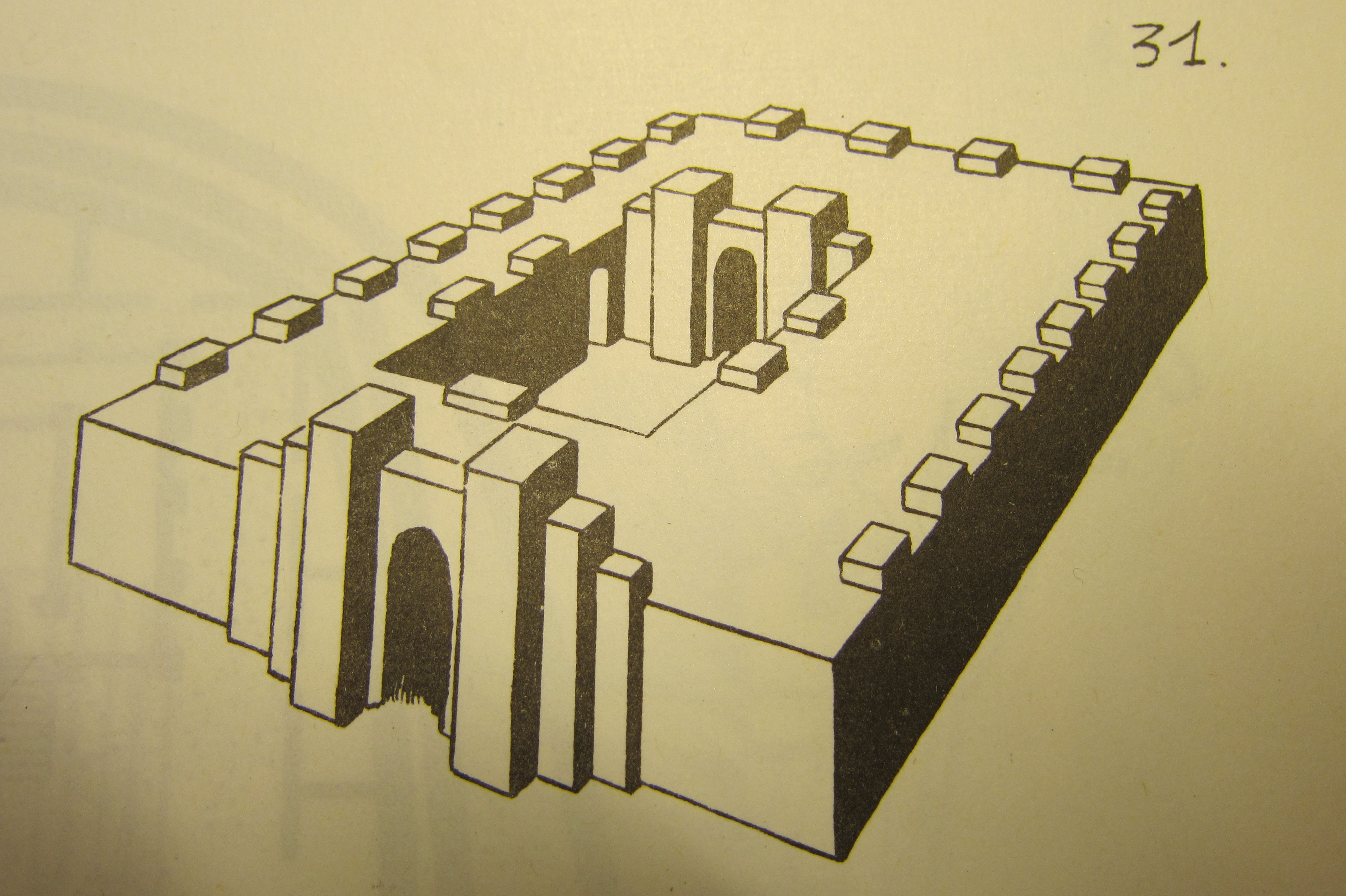 Perspectief Ninmach-tempel, Babylon, Mesopotamië